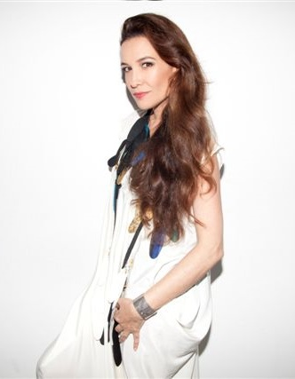 יעל אבקסיס היא שחקנית, דוגמנית ומנחת טלוויזיה ישראלית, זוכת פרס האקדמיה לטלוויזיה.